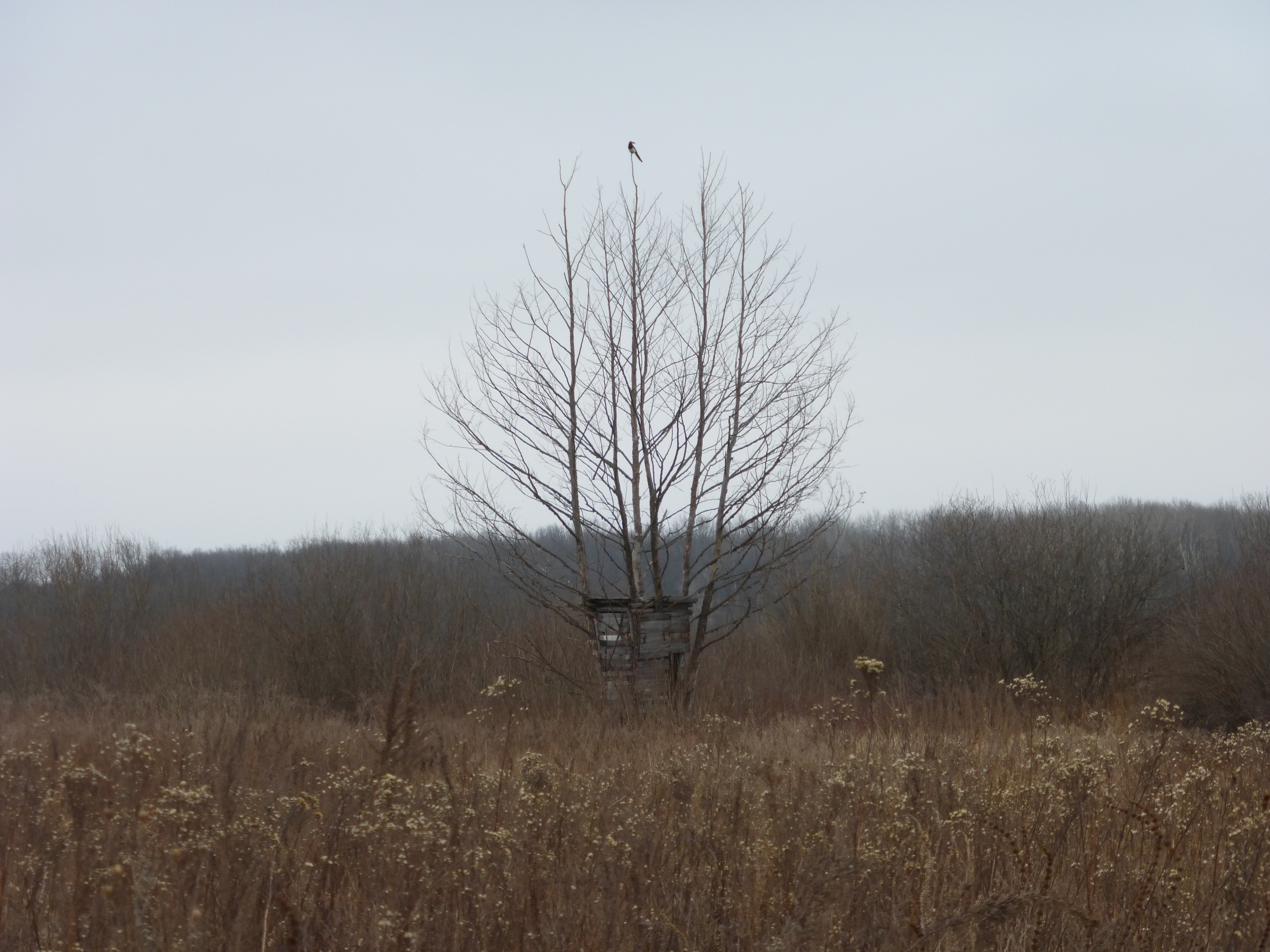 Охотничья засидка, Blind hunting wild boar hunter